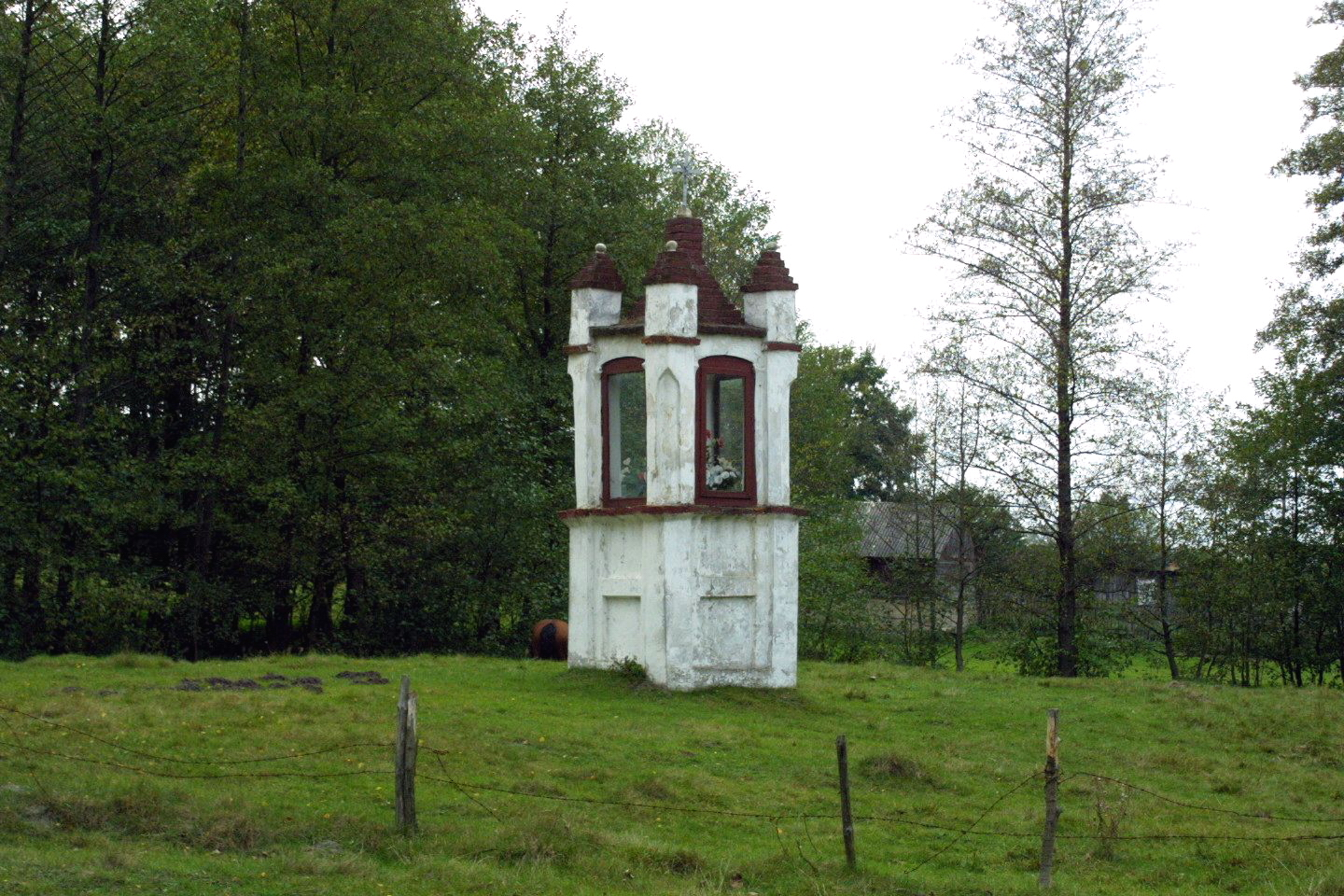 Wólka Okrąglik. Neogotycka kapliczka przydrożna z ok. poł. XIX w. z ludową rzeźbą św. Jana Nepomucena